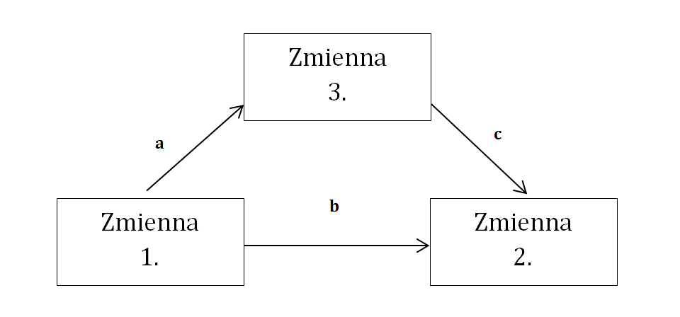 Mediacja